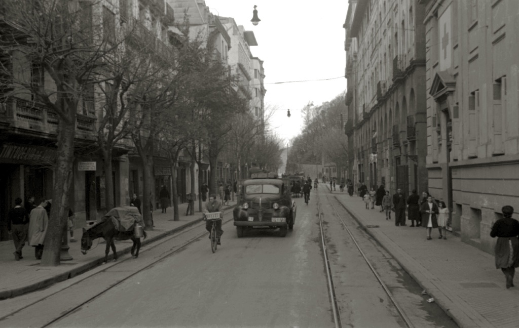 Título original: Vista de la calle Matia del barrio del Antiguo (2/3) Localización: San Sebastián (Guipúzcoa)